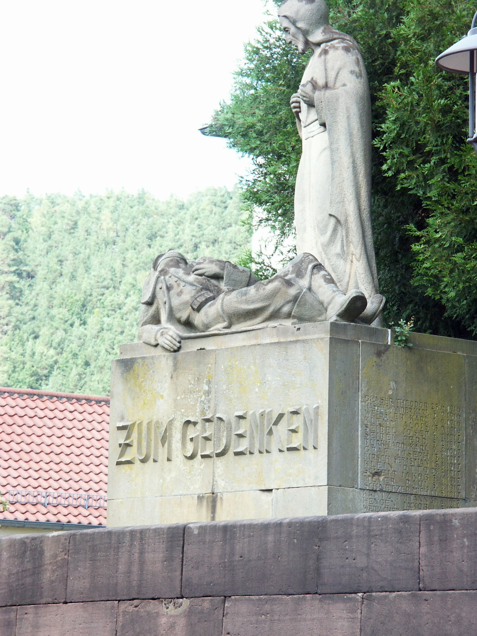 War Memorial - Krieger-/Kriegsopferdenkmal - Mémorial de guerre 1914-1918